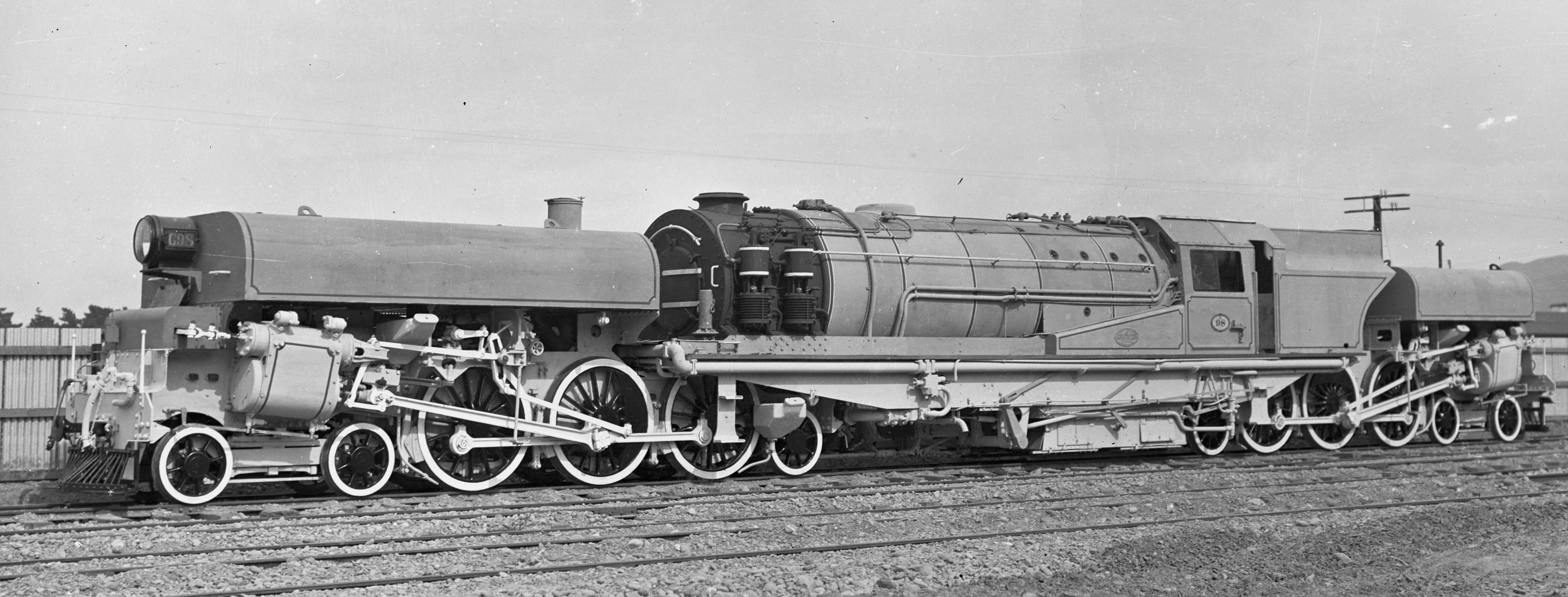 Garratt locomotive (NZR G class (1928))